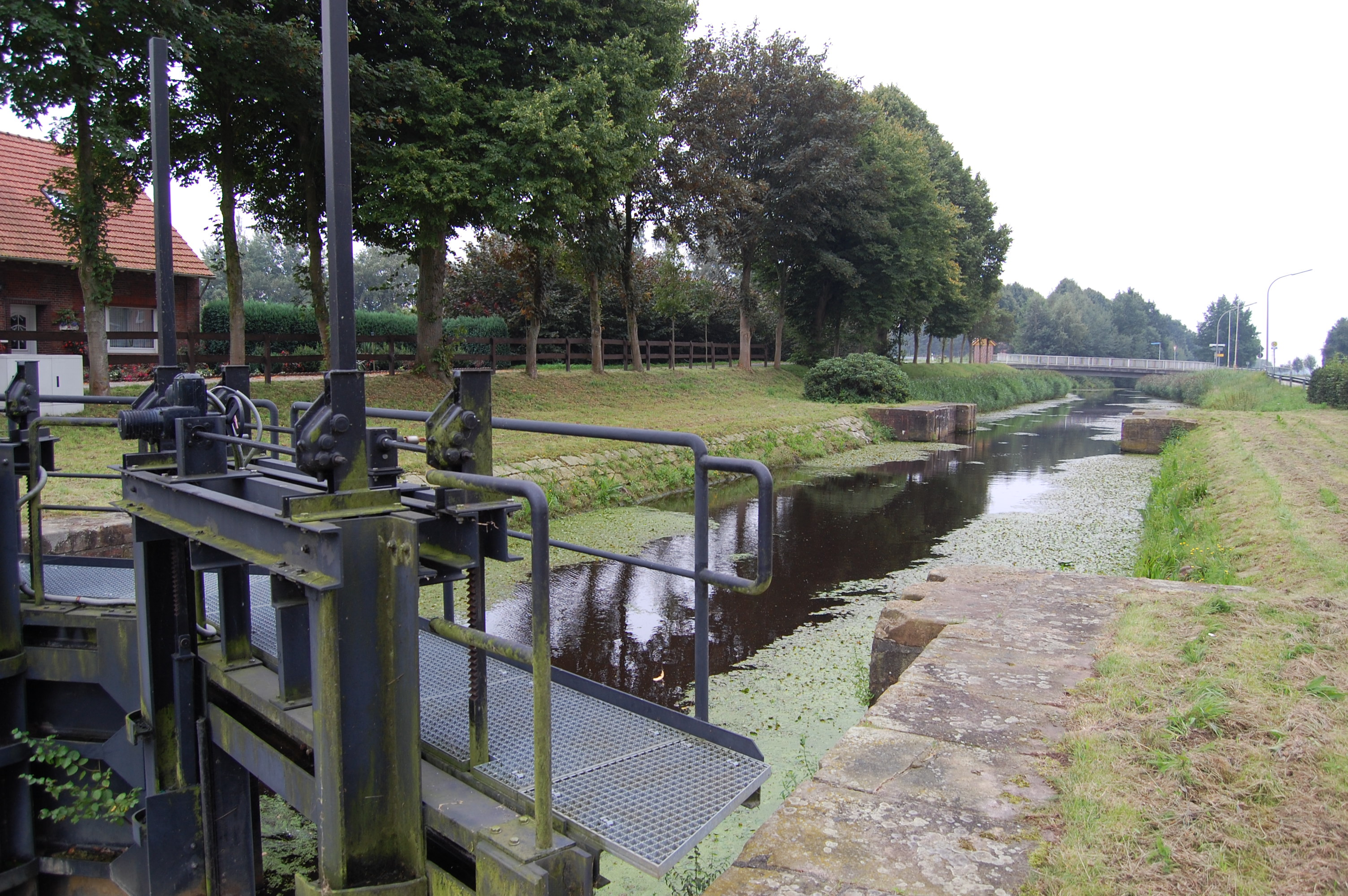 Sluis in het Sud-Nord-Kanal